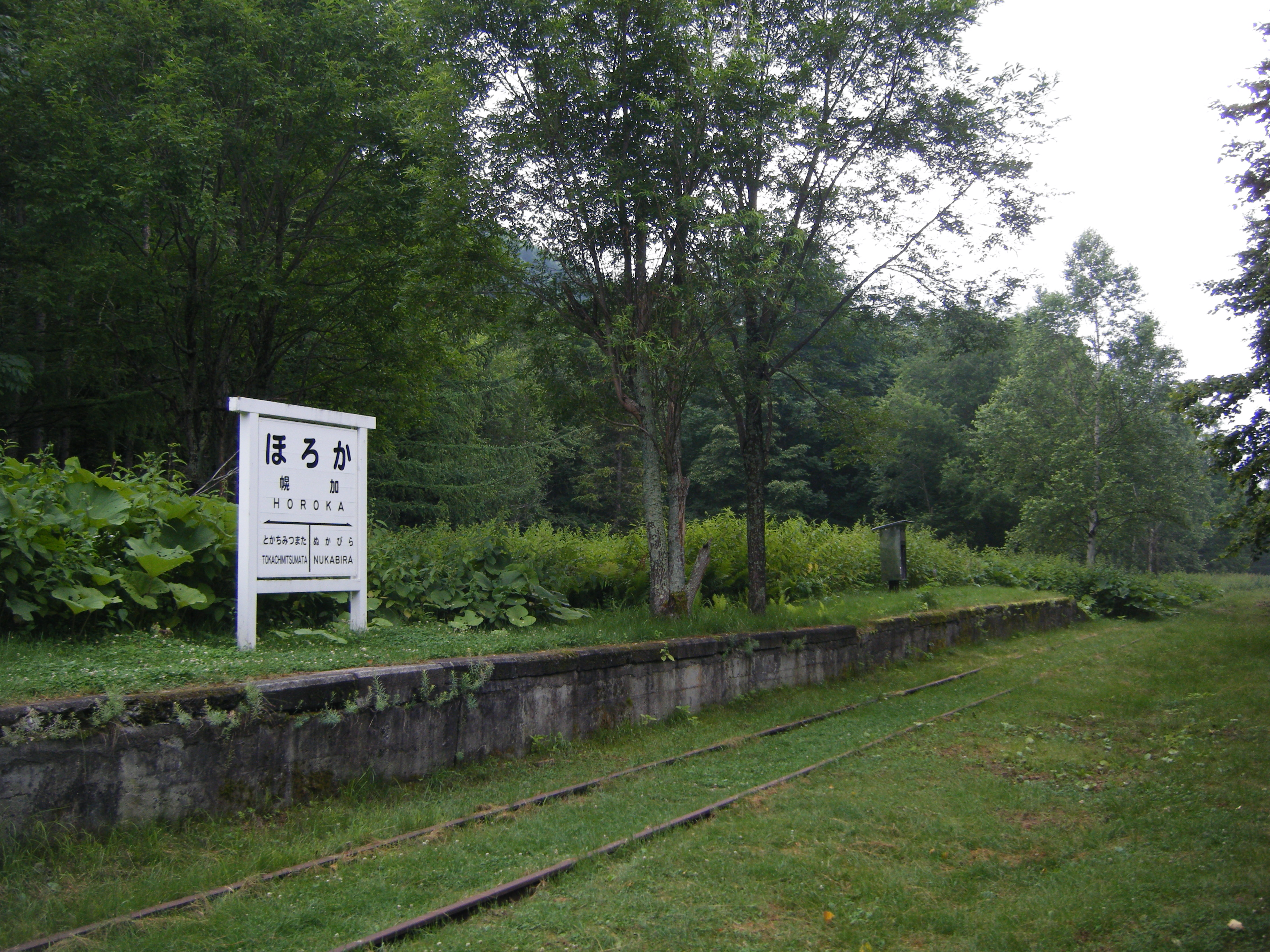 旧国鉄士幌線の幌加駅